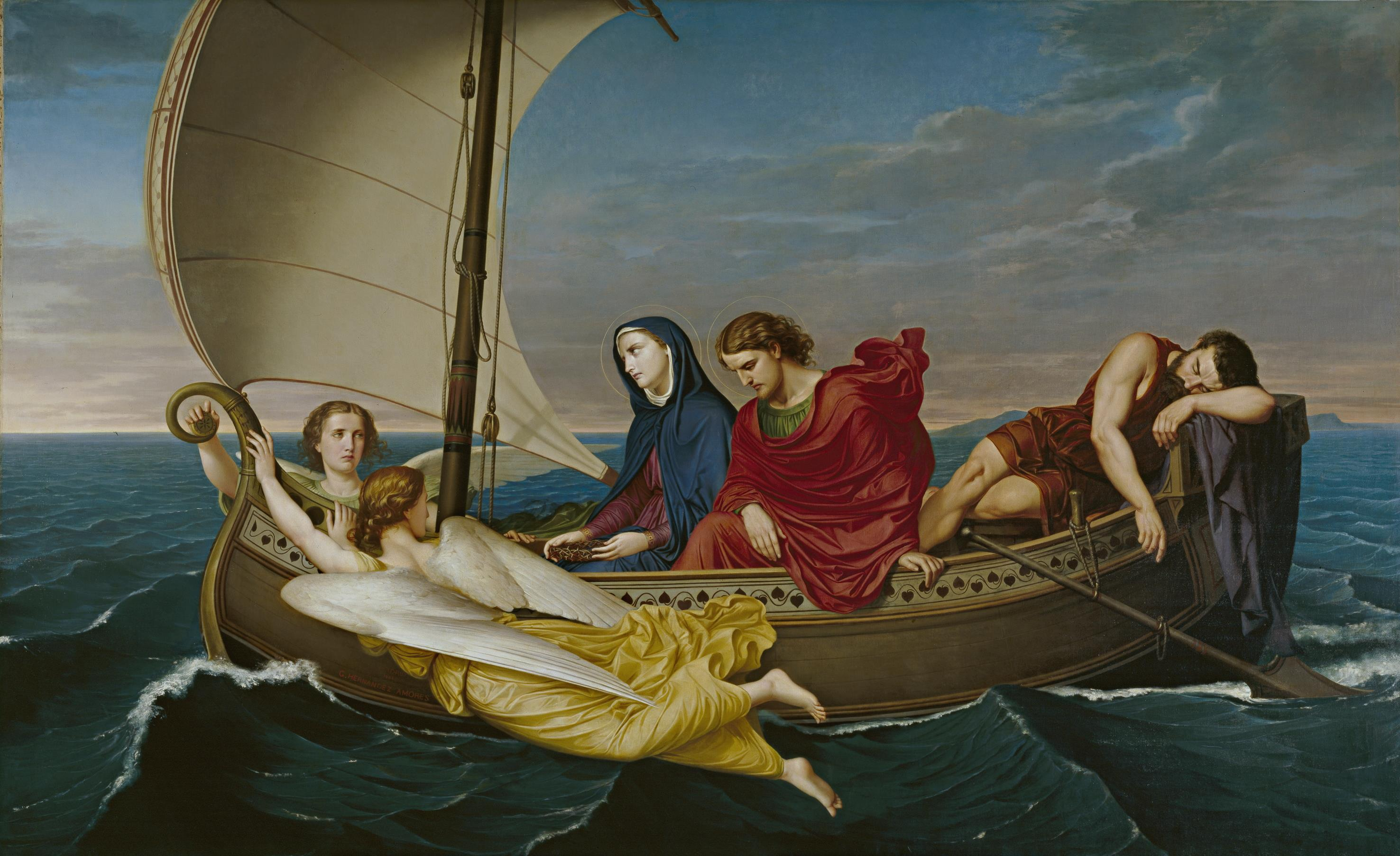 La obra representa a la Virgen María y a San Juan Evangelista viajando a Éfeso después de la muerte de Jesucristo.